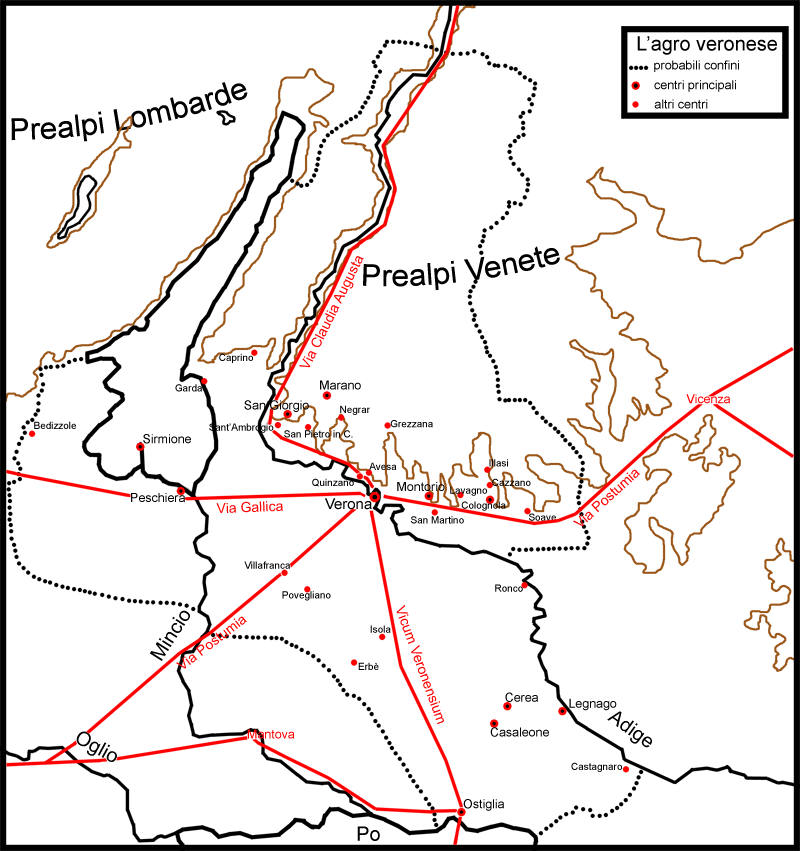 L'agro veronese nell'antica Roma